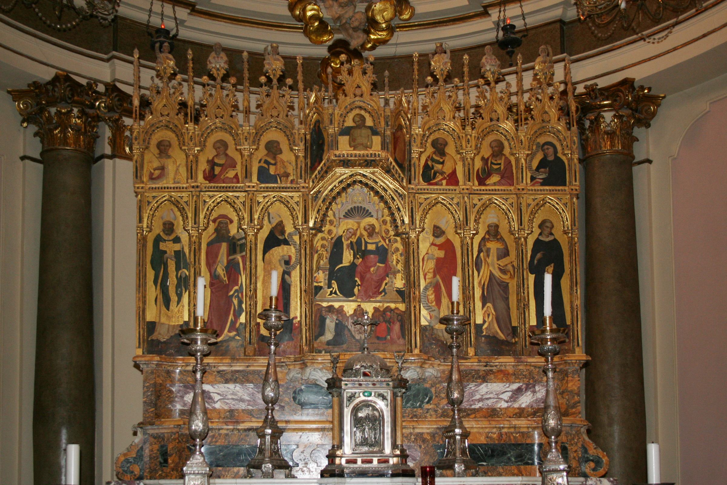 Polittico realizzato nel secondo decennio del quattrocento per la chiesa teramana di Sant'Agostino. L'impianto dell'opera è costituito da sedici tavole disposte su due file. La rappresentazione centrale è un Cristo che incorona la Vergine. Al di sotto è raffigurata la città di Teramo, com'era all'epoca, racchiusa tra i due fiumi che formano una Y; questa immagine, nel tempo, è divenuta uno dei simboli della città ed ancora oggi è richiamata nel logo dell'Università di Teramo. Attualmente è esposto e conservato all'interno del duomo di Teramo. Un sentito ringraziamento a Don Aldino Tomassetti, parroco del duomo di Teramo, che ha consentito lo scatto di questa immagine.